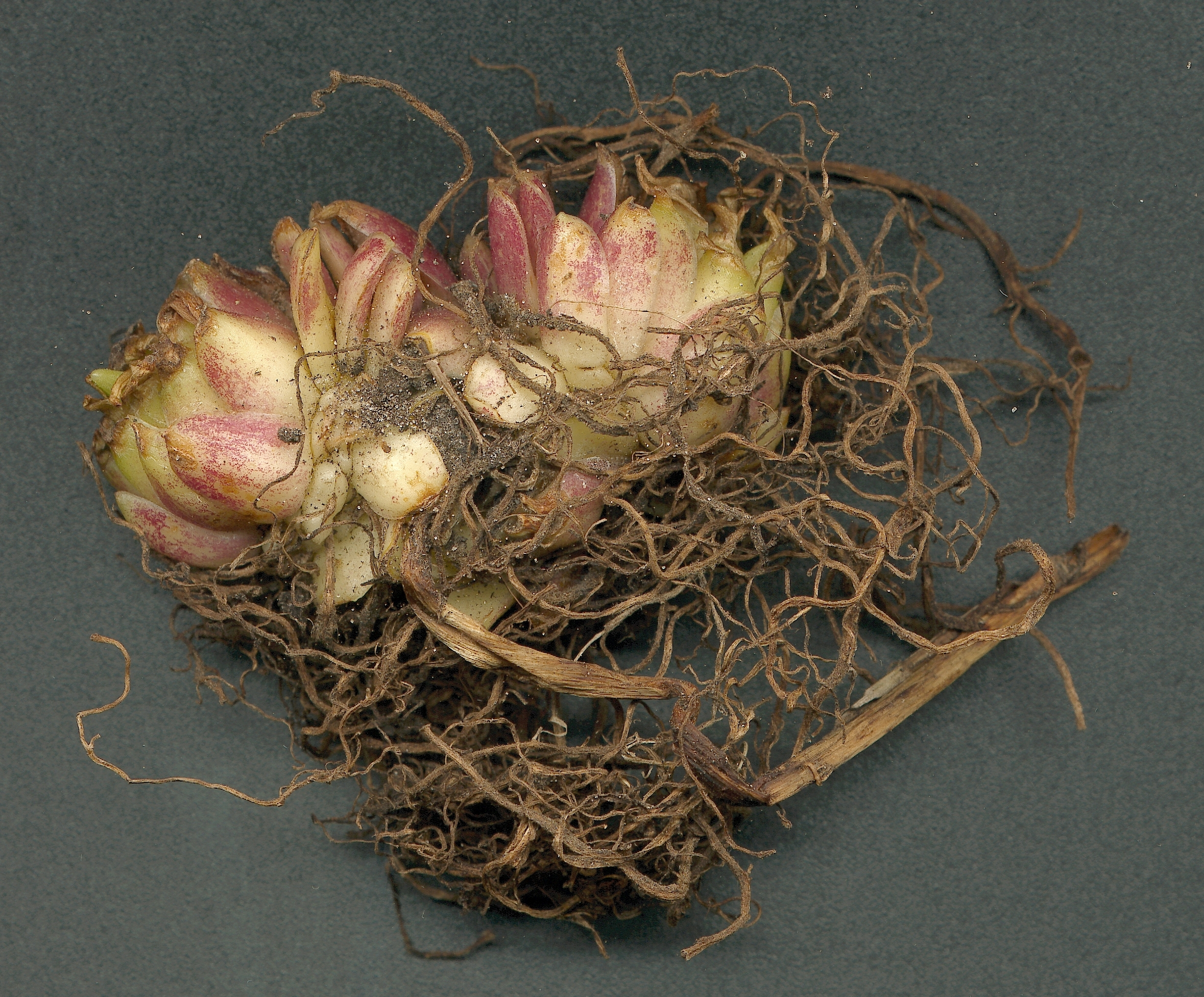 Lilium pardalinum Bulbus